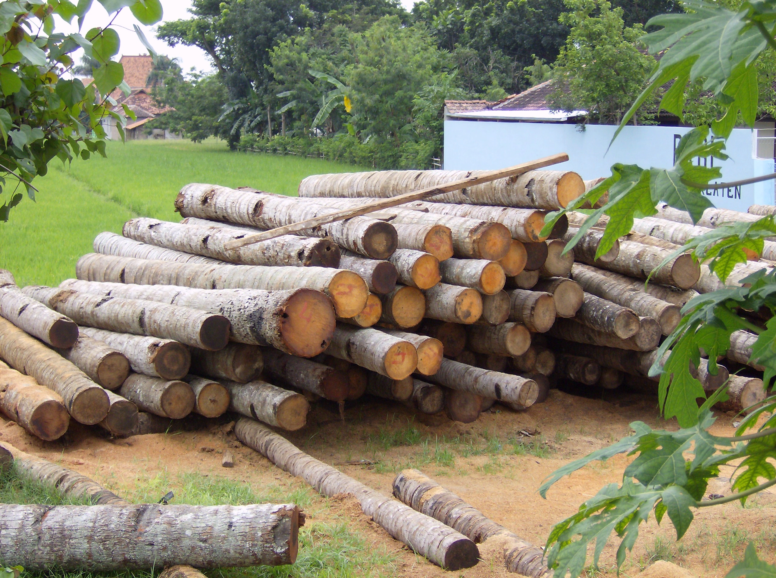 Made by Meursault2004 aka Revo Arka Giri Soekatno